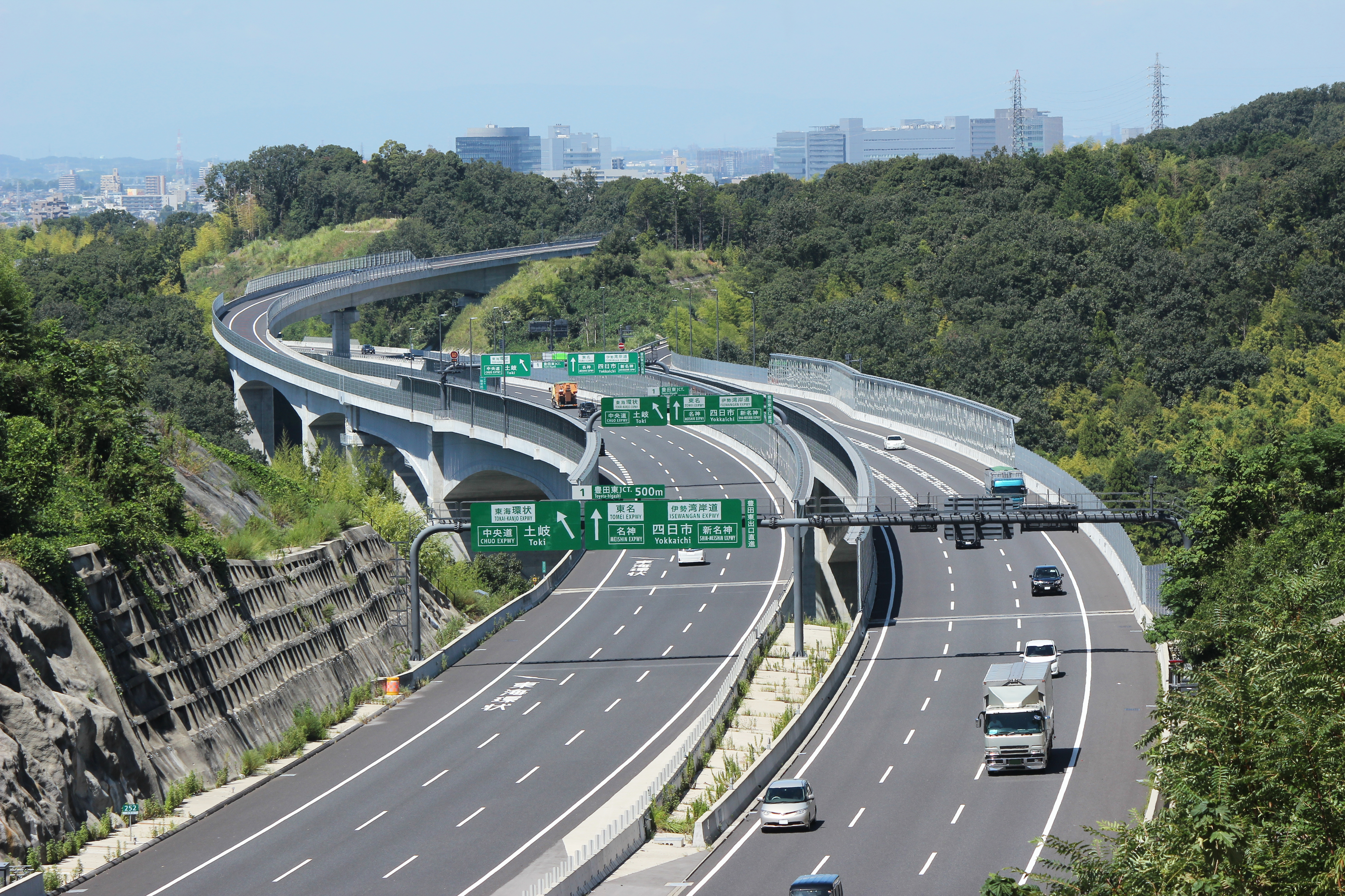 新東名高速道路 中垣内跨道橋（251.7KP）から豊田東JCT方面を望む。